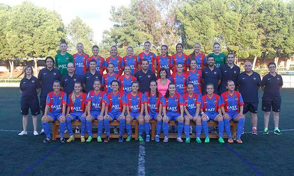 Plantilla 2015-2016